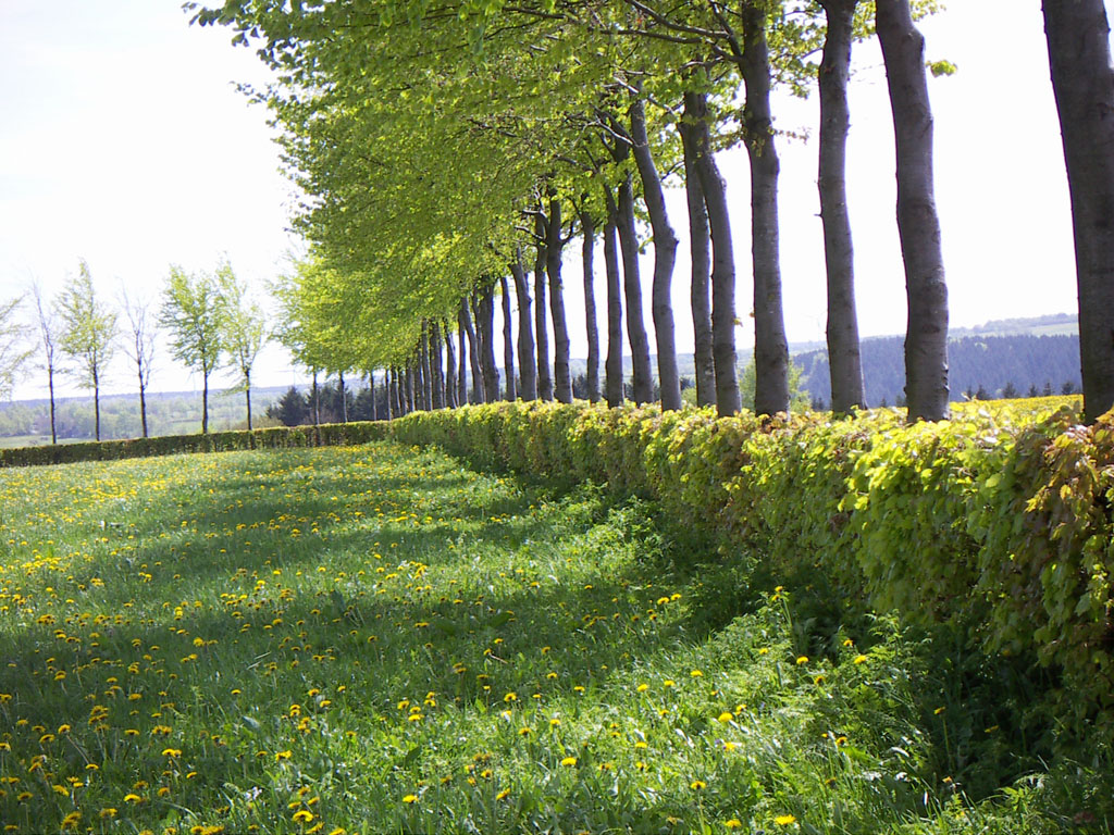 Typische Feldbegrenzung durch Rotbuchenhecken (Fagus sylvatica) in der Nord-Eifel. In regelmäßigen Abständen werden Stämme stehengelassen. Sie wachsen zu richtigen Baumen aus und dienen der (Brenn-) Holzgewinnung. Auf der Wiese Löwenzahn (Taraxacum officinale).